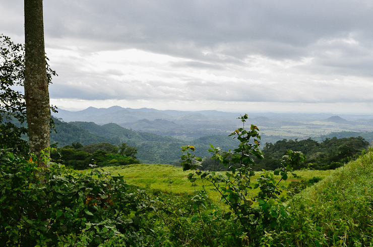 Monrovia, Liberia